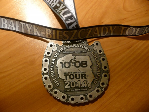 Medal BBT